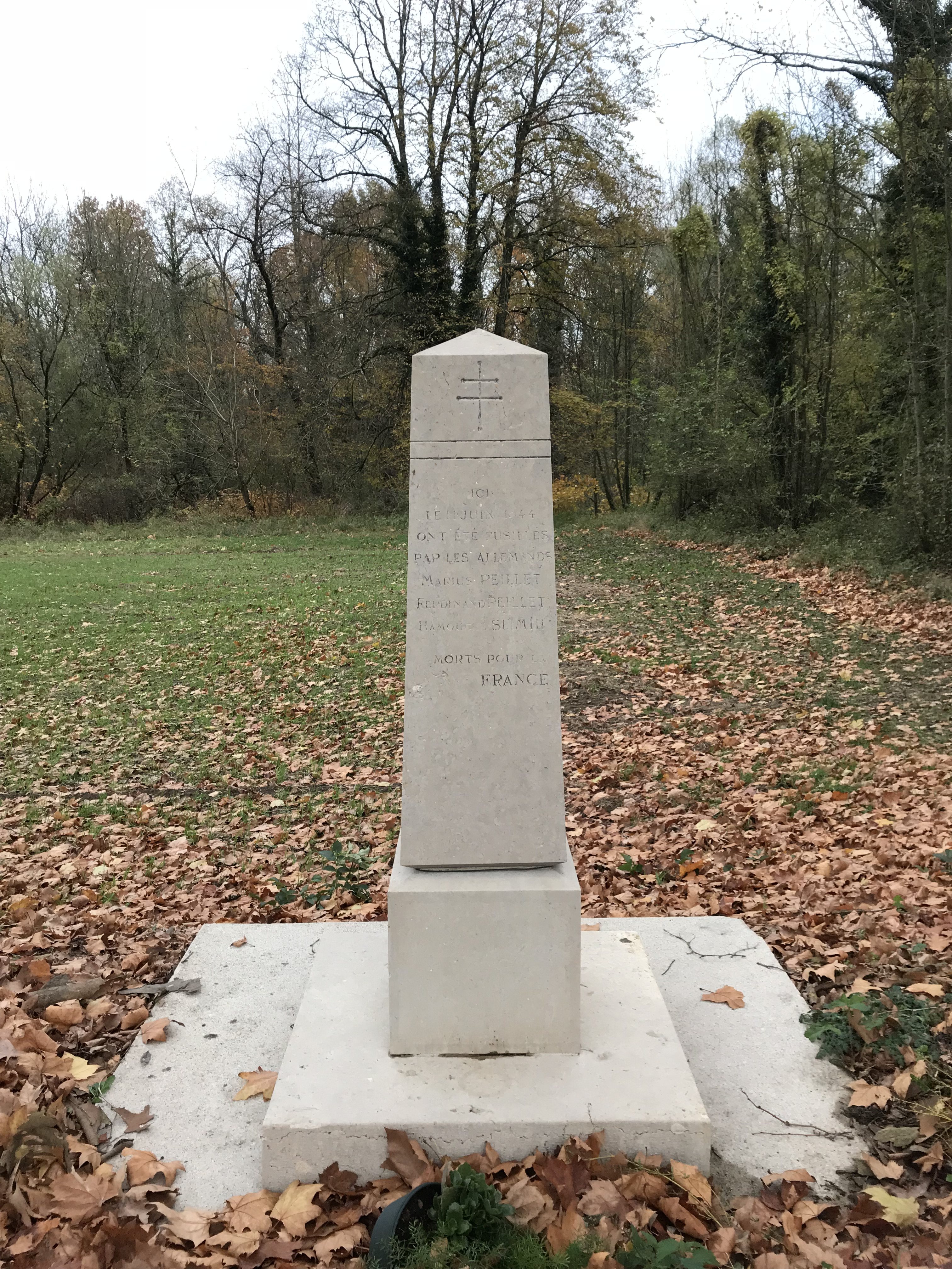 Monument à Ferdinand et Marius Peillet et à Hamouche Slimmih (Mollon, Villieu-Loyes-Mollon, France) en novembre 2017.